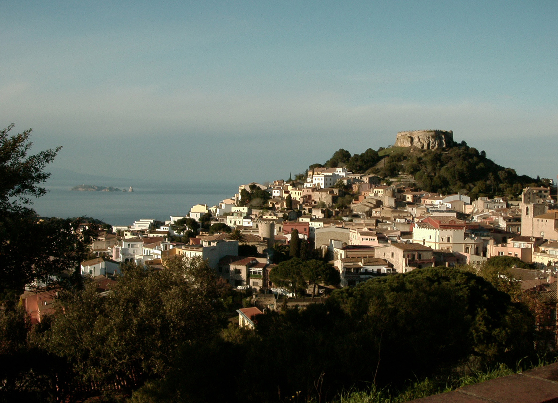 Blick über Begur und die Medas-Inseln (Katalonien, Costa-Brava) Datum: 09.2005 Urheber: M. Pfeiffer alias Gordito1869 Quelle: privates Fotoarchiv des Urhebers